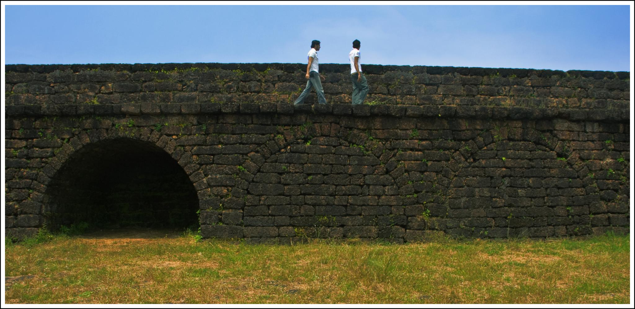 Fort Aguada - a Portuguese fort in Goa, India